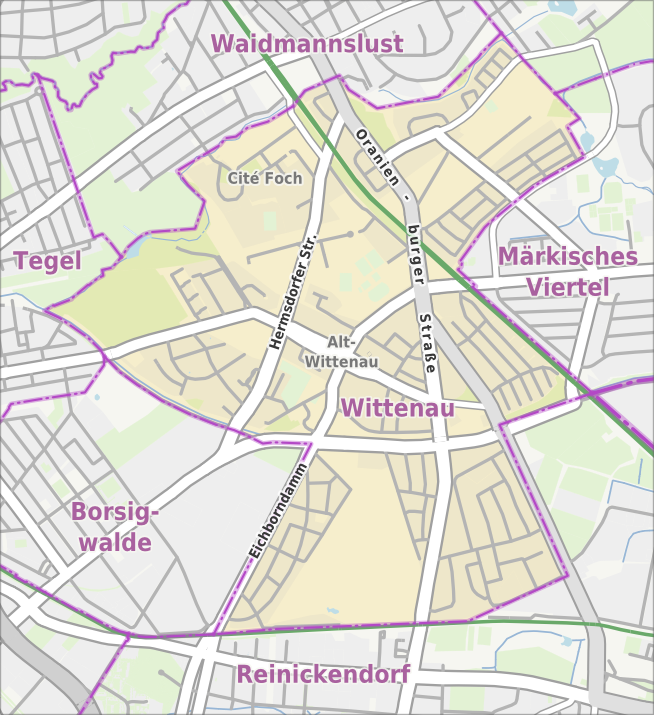 Übersichtskarte der Straßen und Ortslagen in Berlin-Wittenau